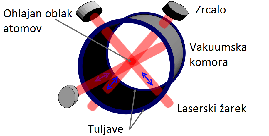 Eksperimentalna postavitev magneto-optične pasti.